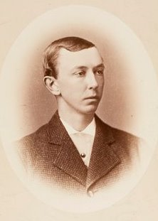 Augustus Hemenway Jr